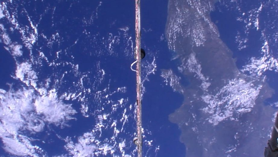 Karibische Inseln (Toshiba, nadir view)